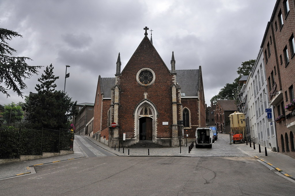 De Sint-Antoniuskapel dateert oorspronkelijk uit de 13de eeuw. In 1617 herbouwde de Leuvense Artesfaculteit de kapel in laatgotische stijl. Sinds 1936 ligt pater Damiaan hier begraven in de crypte.